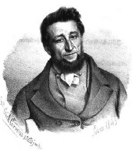 Porträt Friedrich Everhard von Merings